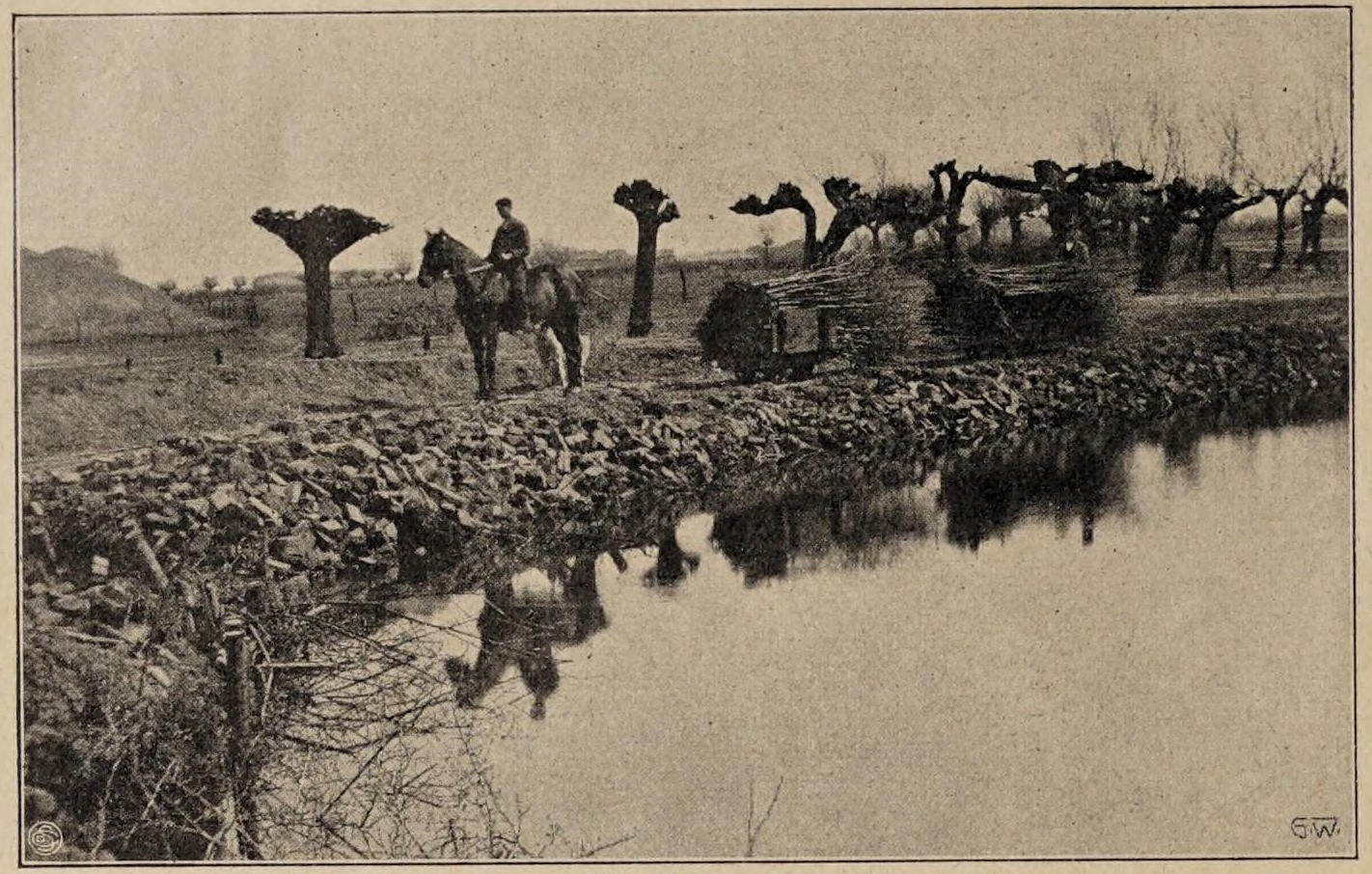 Obstplantage Wilhelm de Joncheere, Cleve am Niederrhein